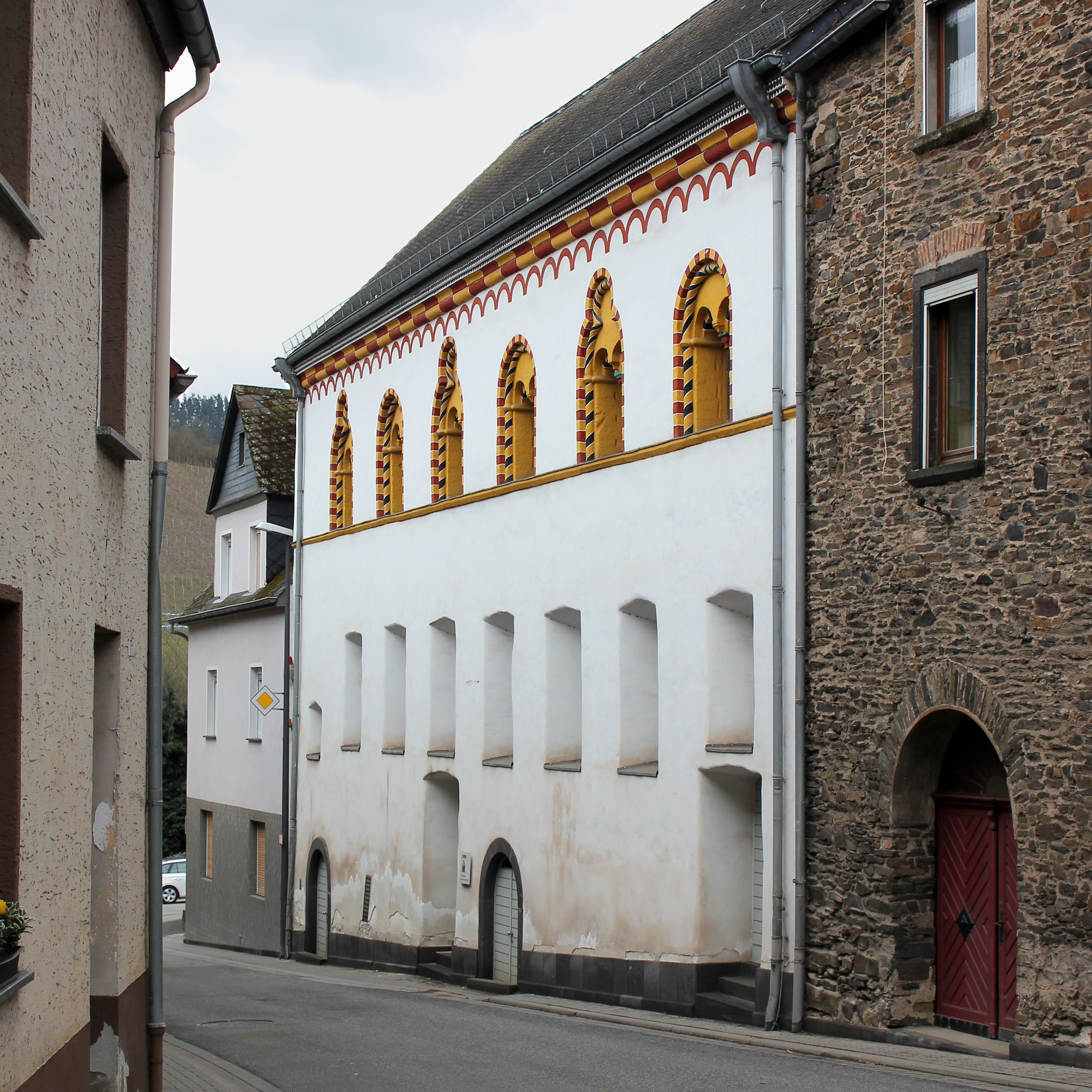 Zehnthaus in Treis-Karden, St.-Castor-Straße 1, ehemaliges Wohngebäude der Stiftsherren aus der Zeit um 1200.